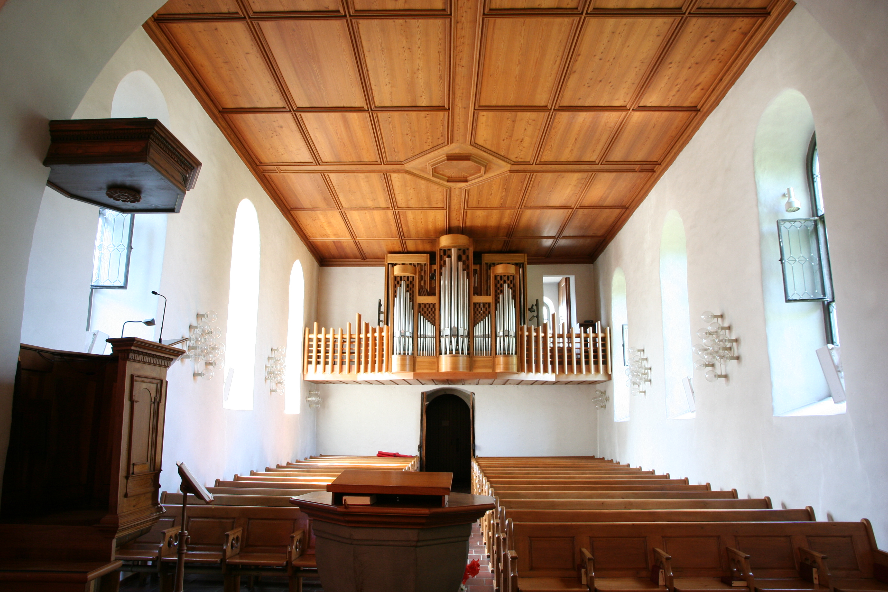 Evangelisch-reformierte Kirche Schwamendingen in Zürich